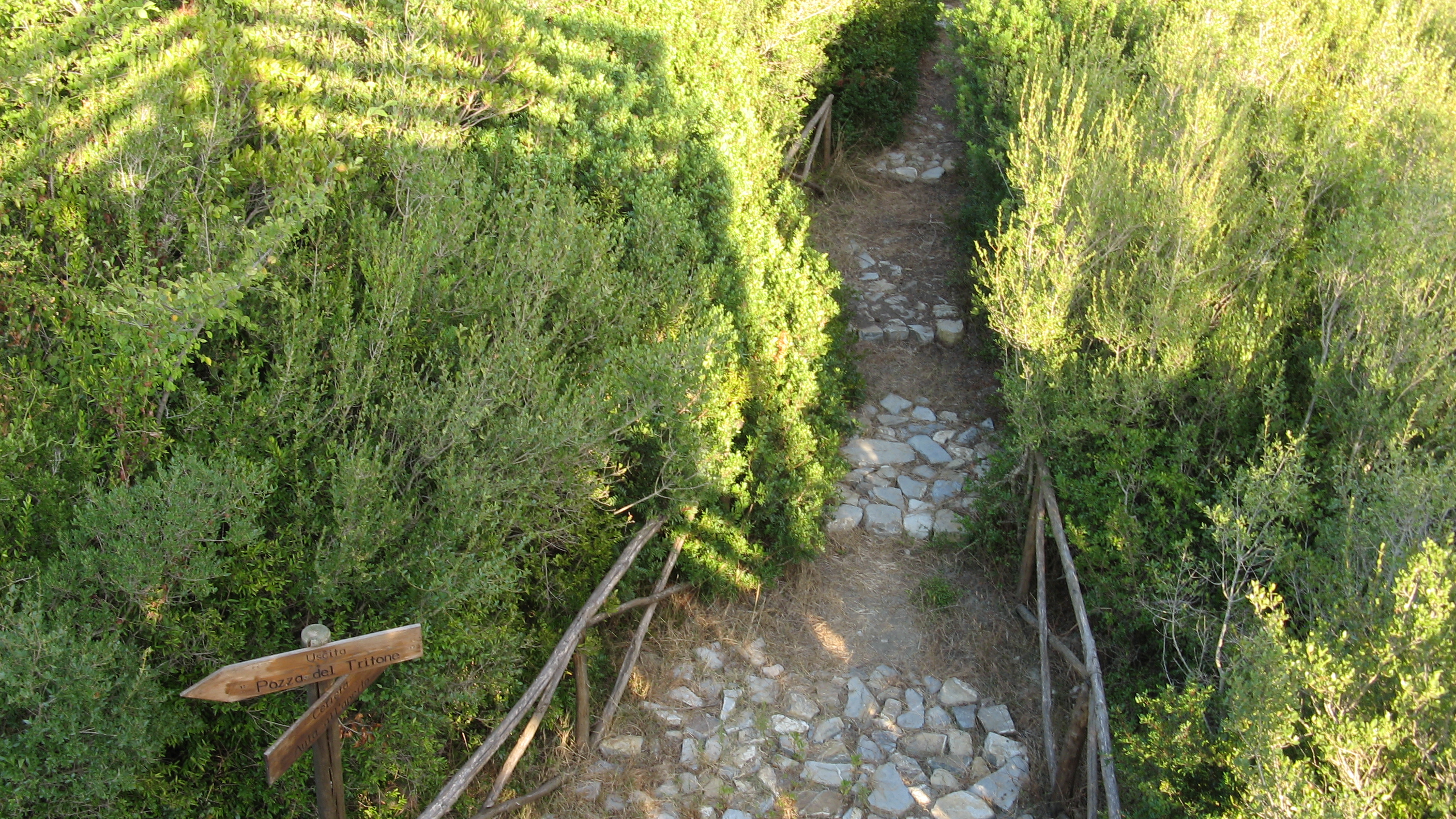 Albanella, Oasi naturalistica Bosco Camerine: sentiero escursionistico.